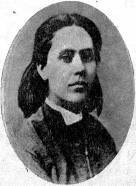 Мария Павловна Лешерн фон Герцфельд - русская револционерка, народница, член организации "Земля и воля".